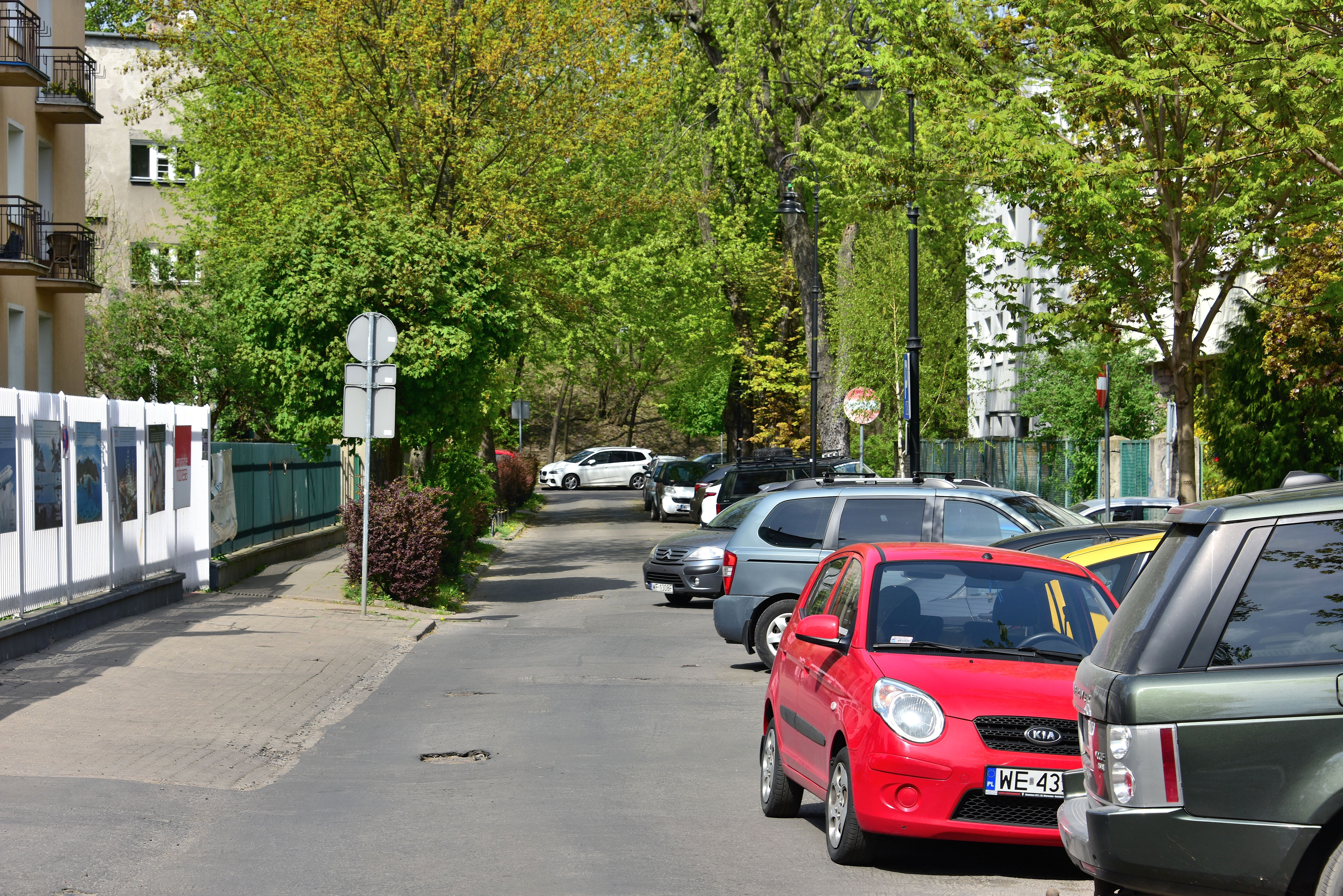 Ulica Estońska w Warszawie